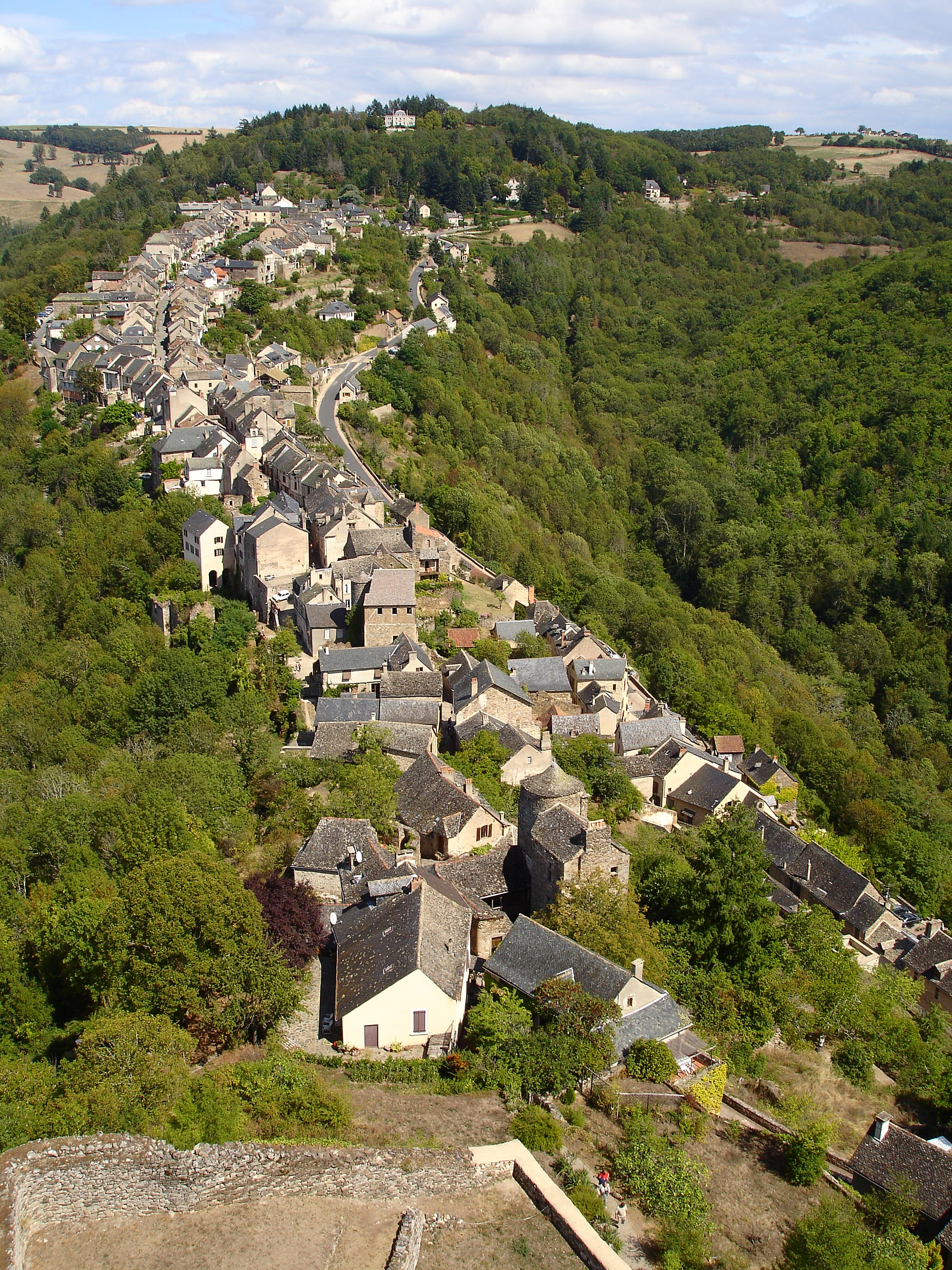 View on Najac, France